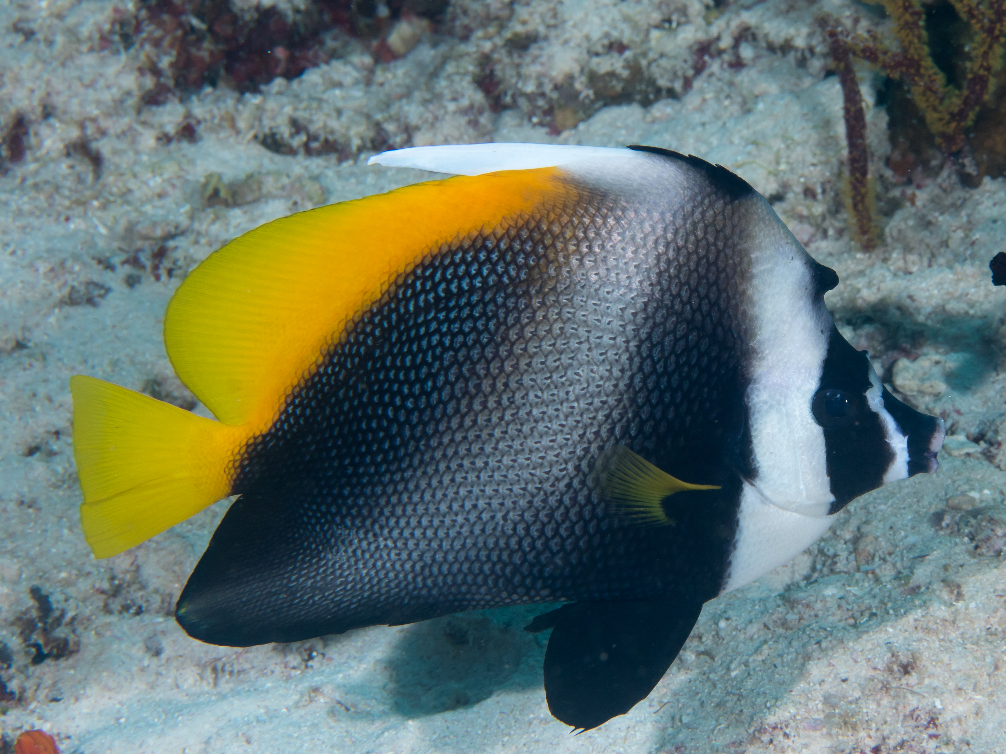 Singular bannerfish (Heniochus singularius). Raja Ampat